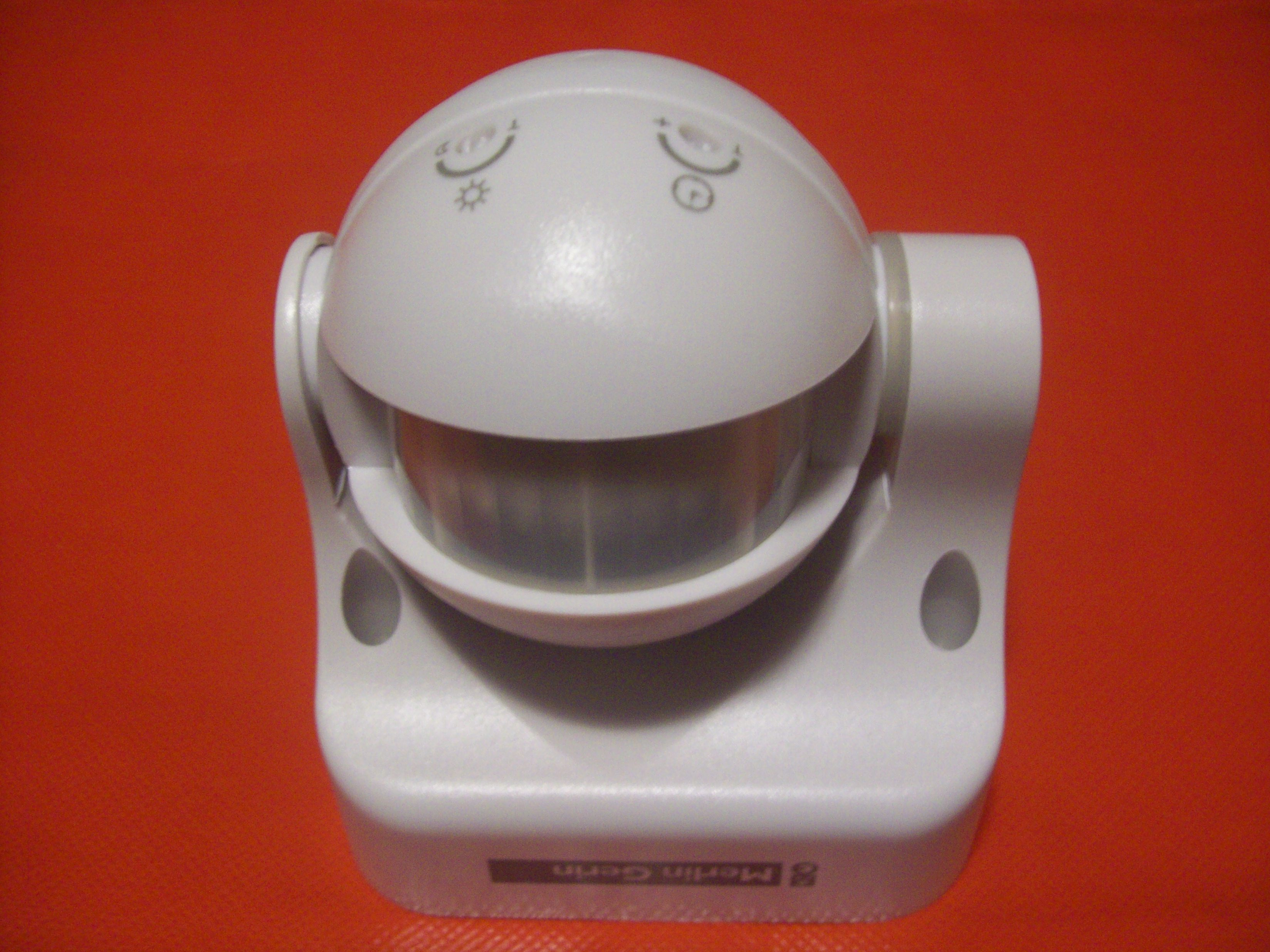 Знято мобілкою Самсунг